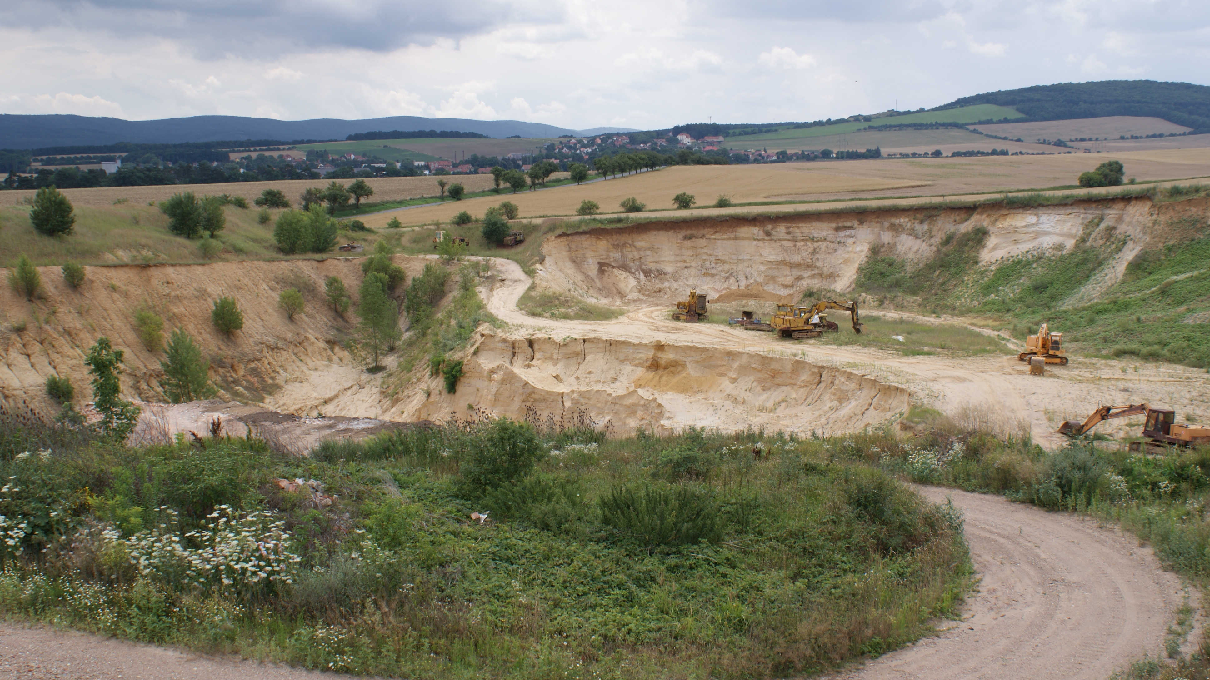 Pískovna Běleč - těžební stroje - Naučná stezka Liteň Naučná stezka Liteň nabízí turistům a návštěvníkům procházku nebo projížďku na kole po pozoruhodnostech malebného městyse Liteň v okrese Beroun. Liteň leží 5 km od Karlštejna a 15 km od Berouna, takže je ideálním cílem výletu pro obyvatele a návštěvníky Prahy. Témata zastavení Naučné stezky Liteň jistě zaujmou každého návštěvníka. Její zastavení nabízejí informace pro milovníky přírody, zájemce o geologii, botaniku i dendrologii, technické památky, historii i architekturu